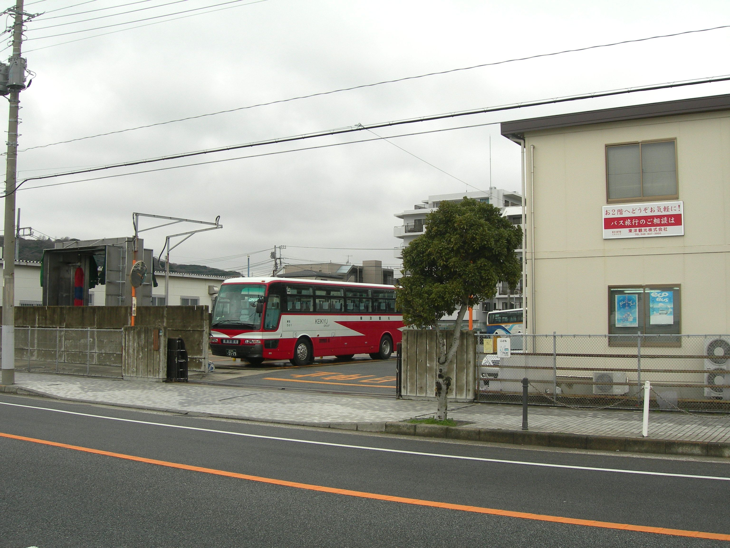 京急グループ・東洋観光 本社・営業所 （横須賀市久里浜）